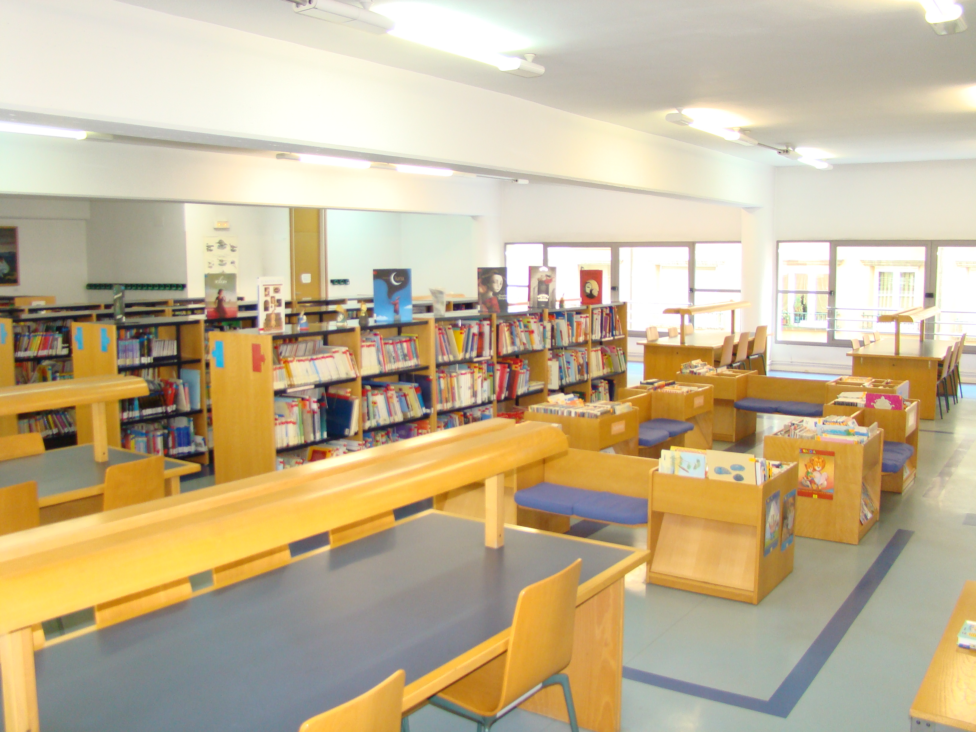 Detalle de la sala infantil de Lugones